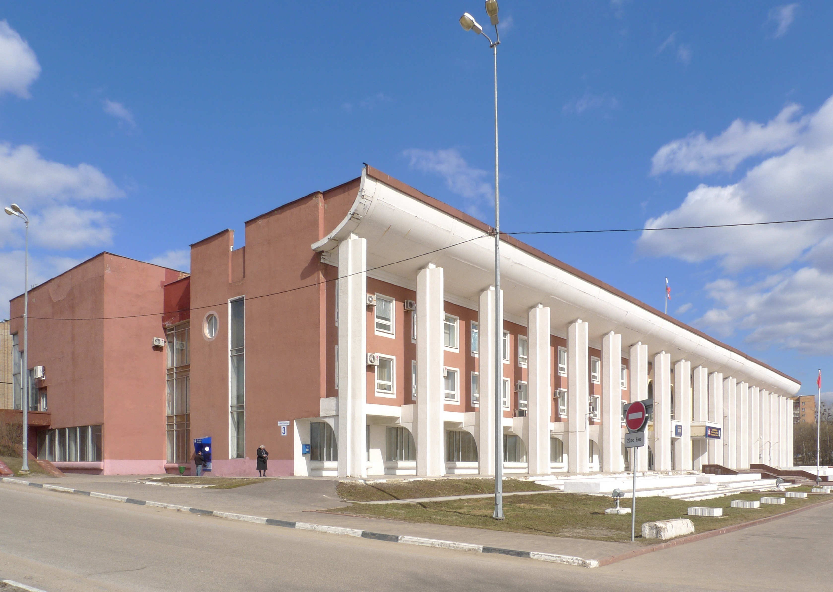 Чехов, здание администрации Чеховского района